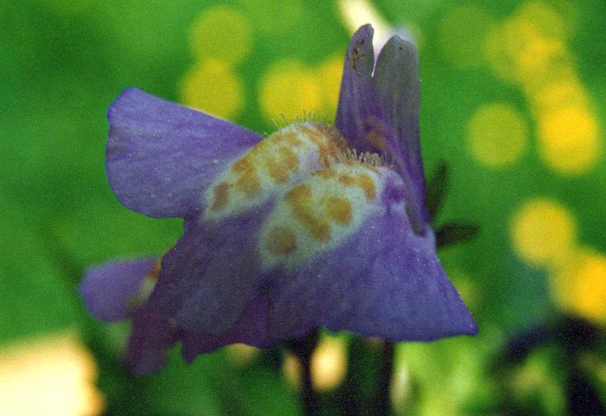 Mazus reptans